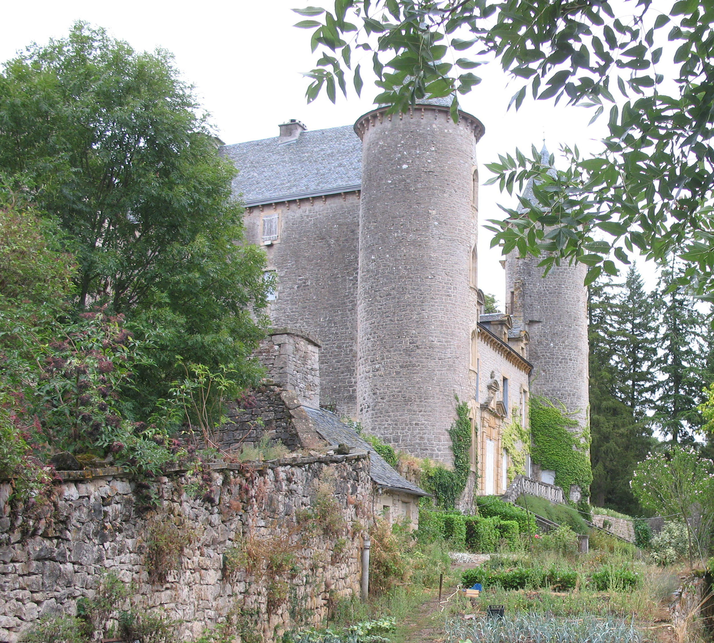 Château de Recoules à Recoules-Prévinquières, dans l'Aveyron.